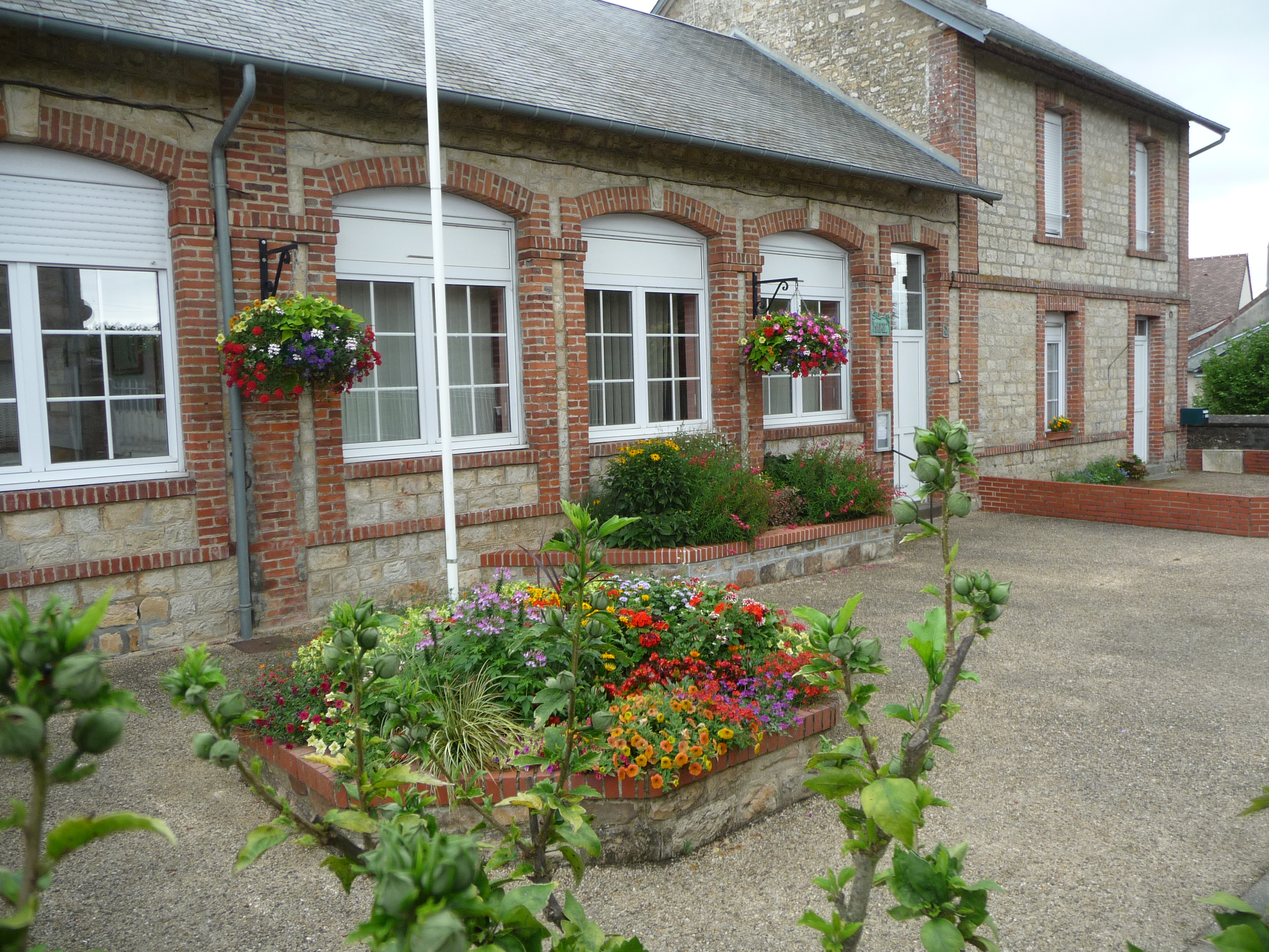 Mairie de St-Michel des Andaines